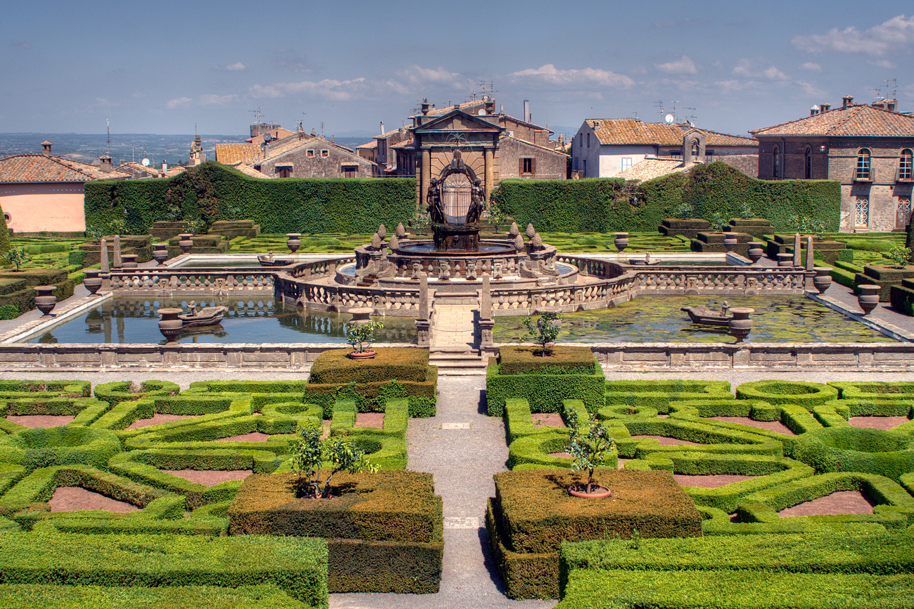 Villa Lante - Bagnaia (VT) Gardens/Jardins/Giardini